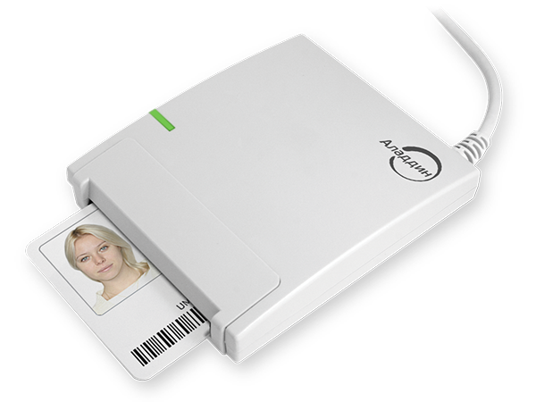 Профессиональный доверенный смарт-карт ридер JCR721 отечественного разработчика "Аладдин Р.Д."